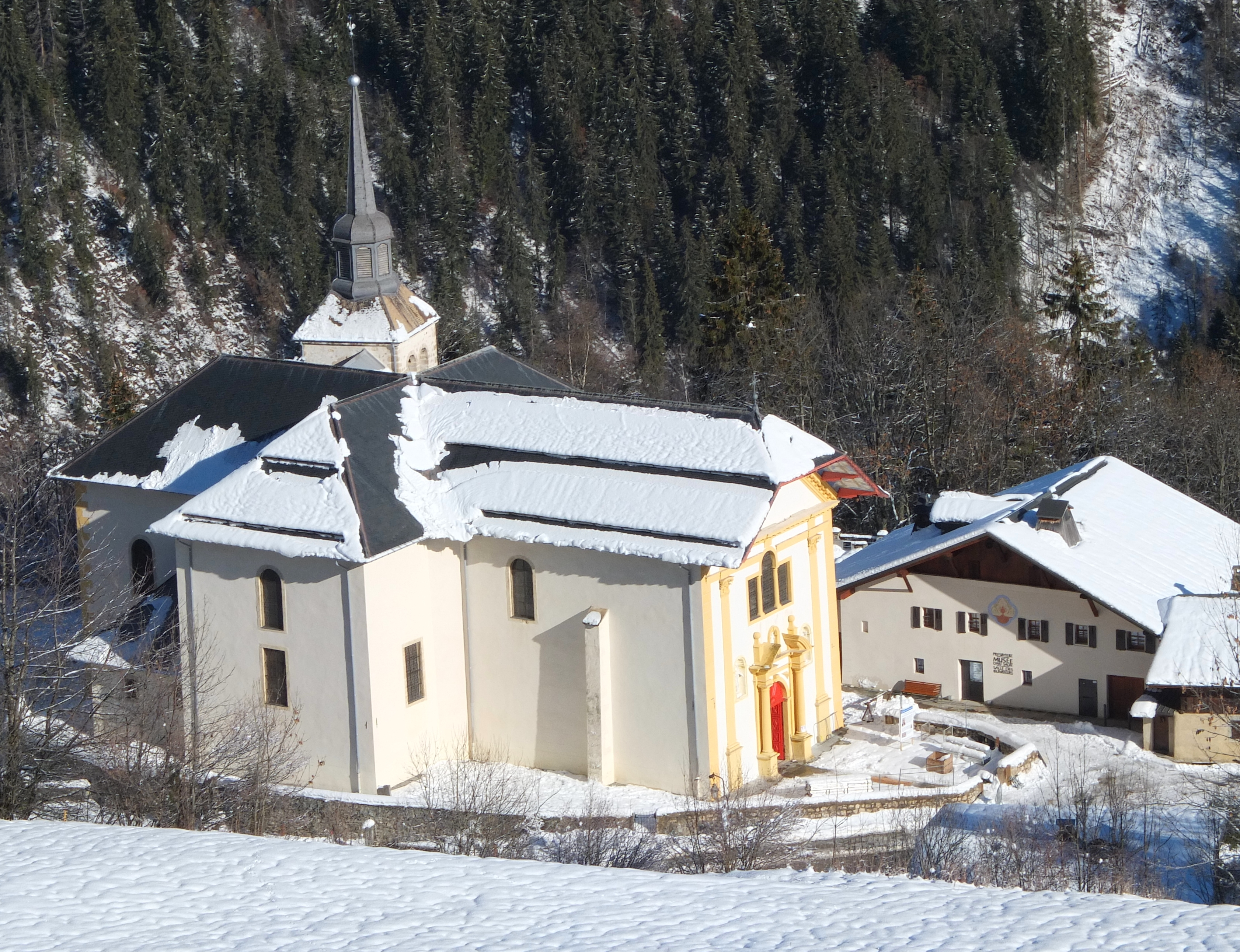 L'église de Saint-Nicolas-de-Véroce (Saint-Gervais-les-Bains, Haute-Savoie) et le musée d'Art Sacré, vue depuis la montée en télésiège.